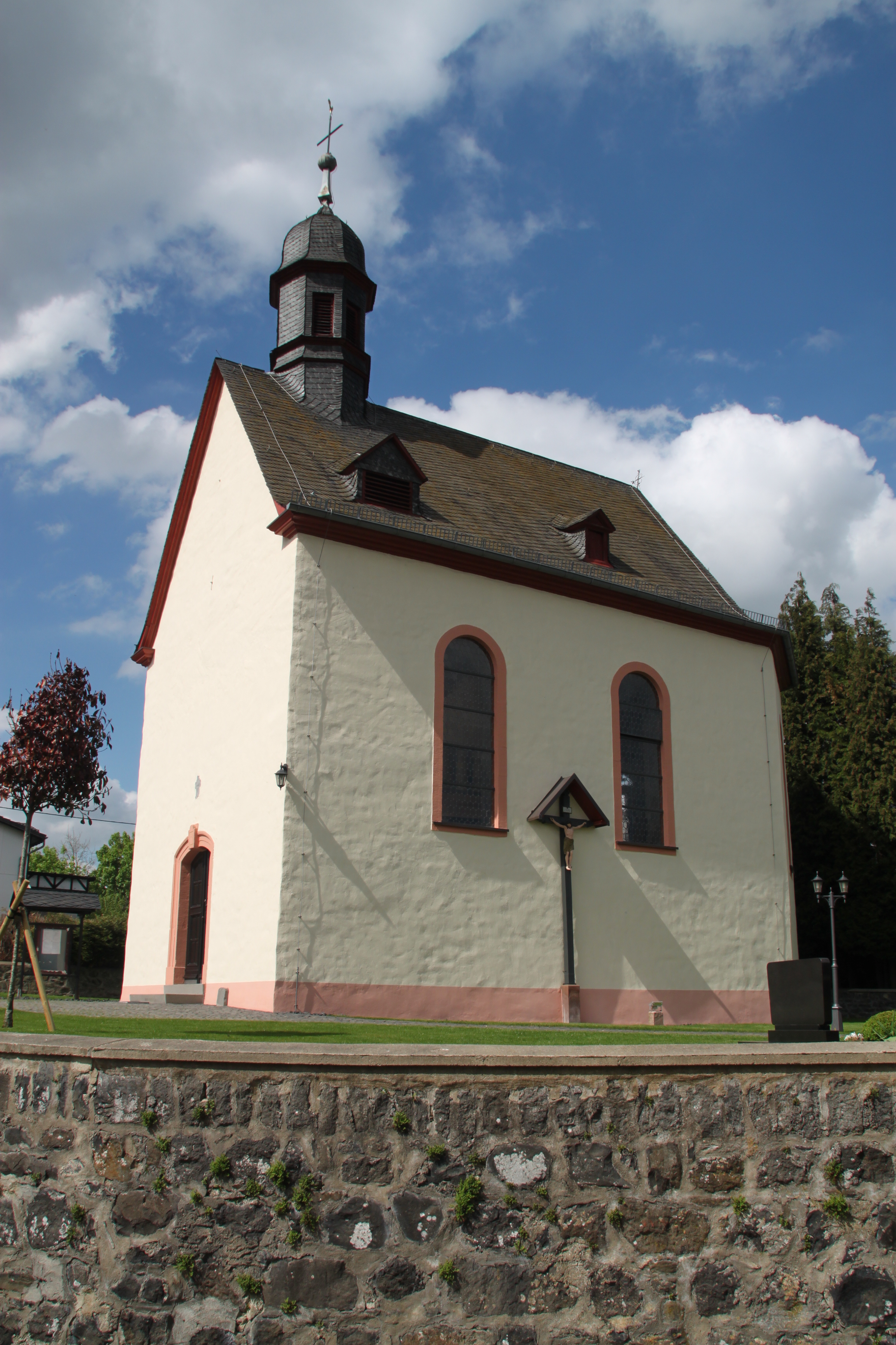 Girod-Kleinholbach, kath. Kapelle St. Peter und Paul